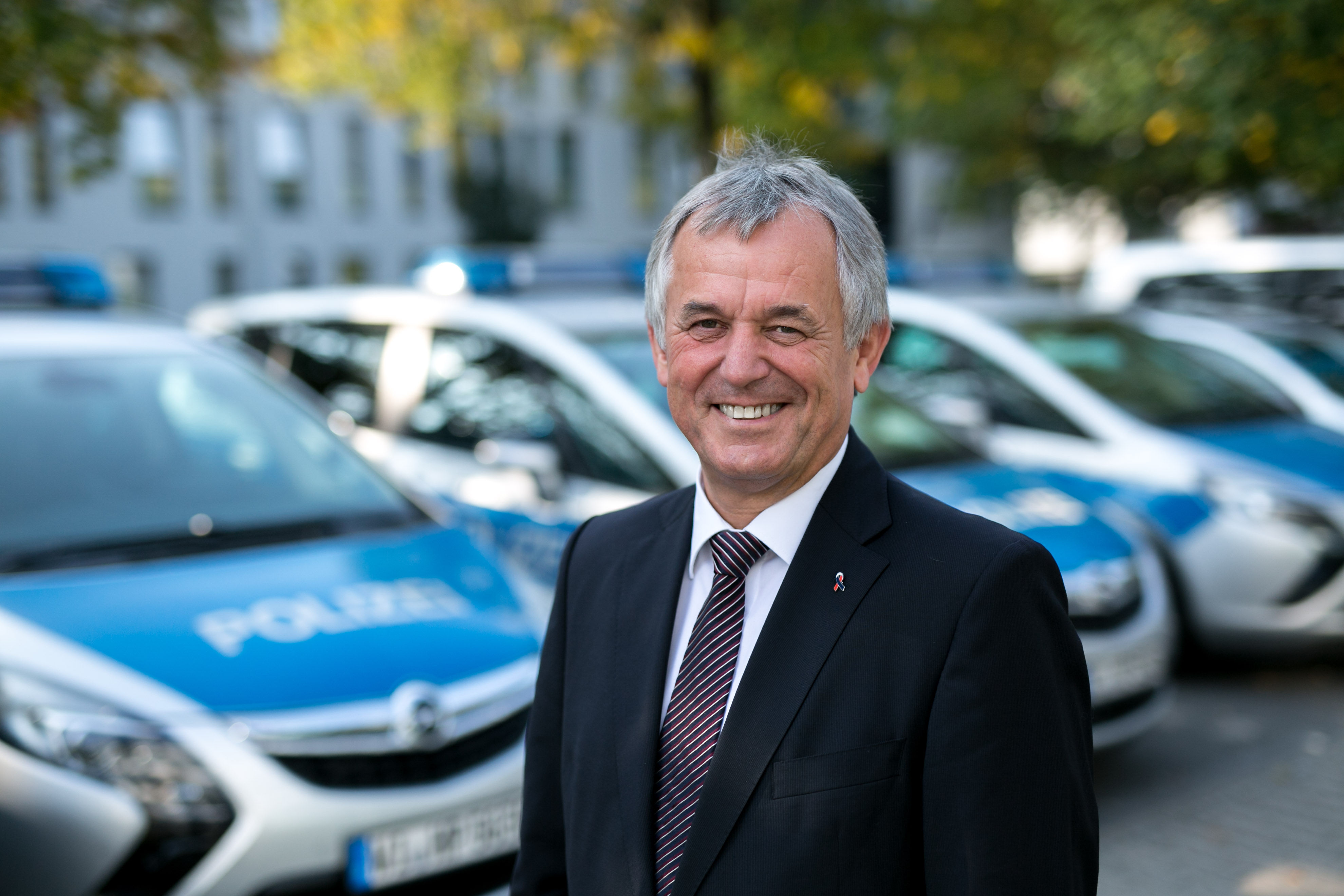 Polizeipräsident Gerhard Bereswill vor dem Polizeipräsidium Frankfurt am Main.